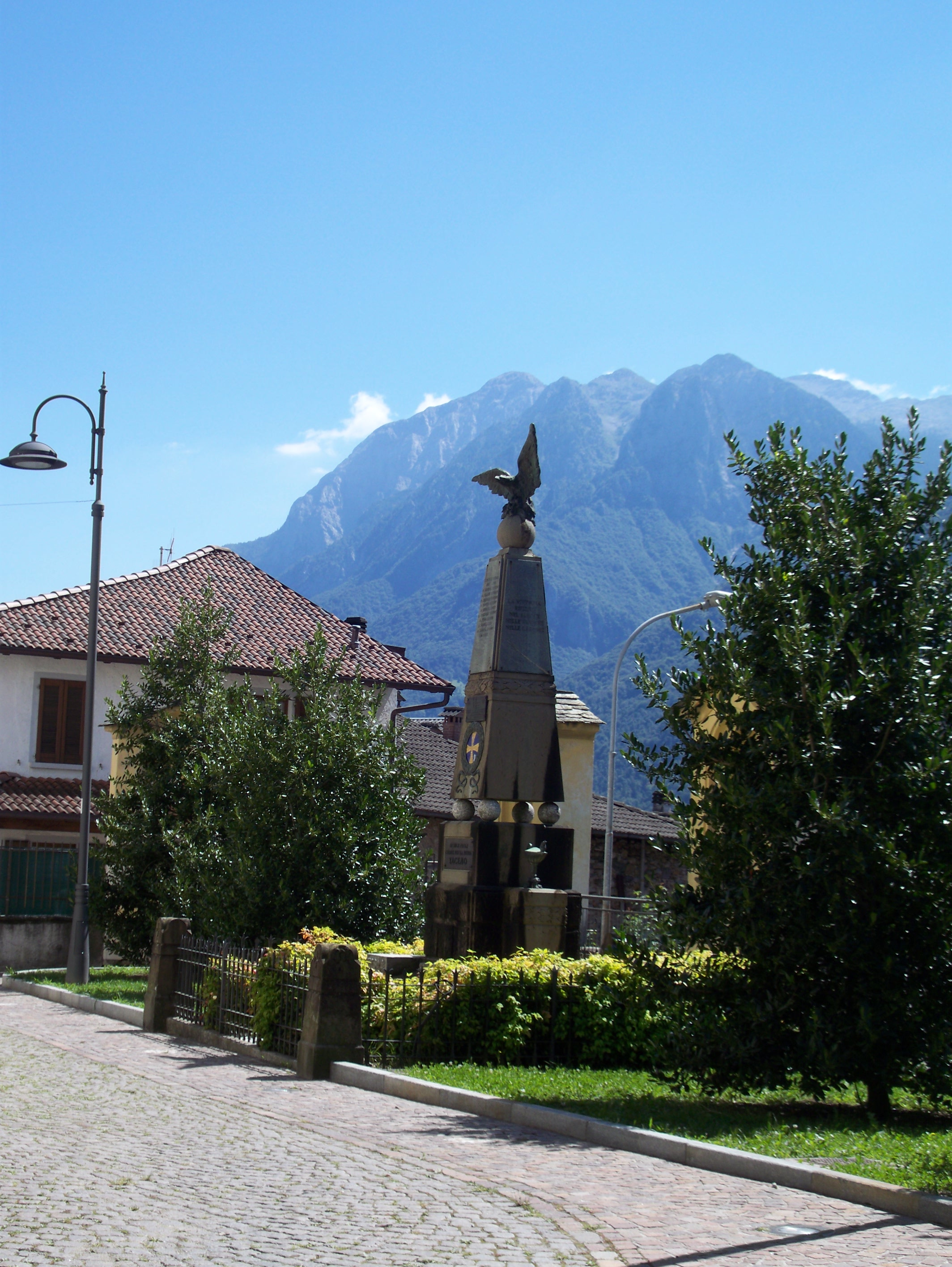 Taceno (Lecco), monumento ai caduti